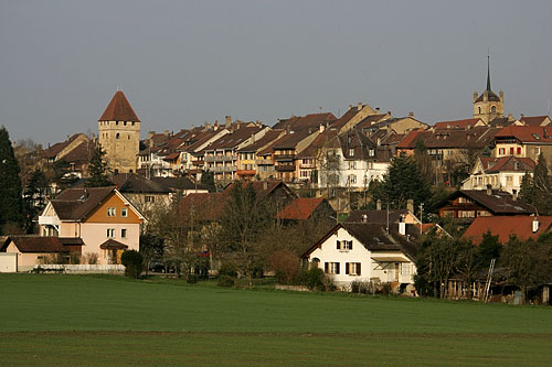 Avenches (Tour de Benneville / Eglise Sainte Madeleine)